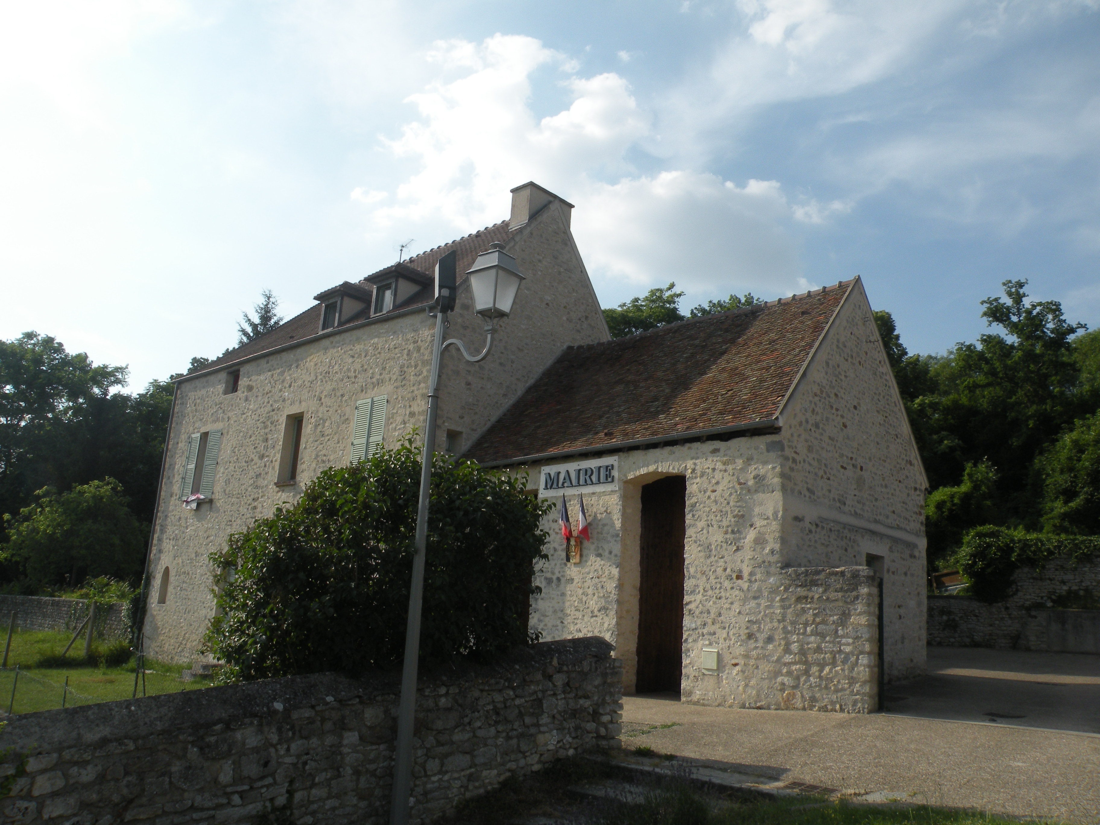 Saint-Cyr-en-Arthies mairie